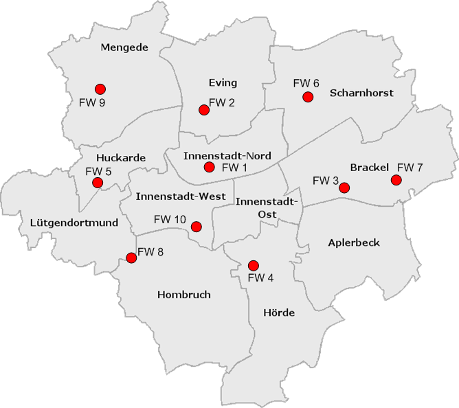 Karte Dortmunds mit Bezeichnung der Stadtteile und Darstellung der Feuerwachen